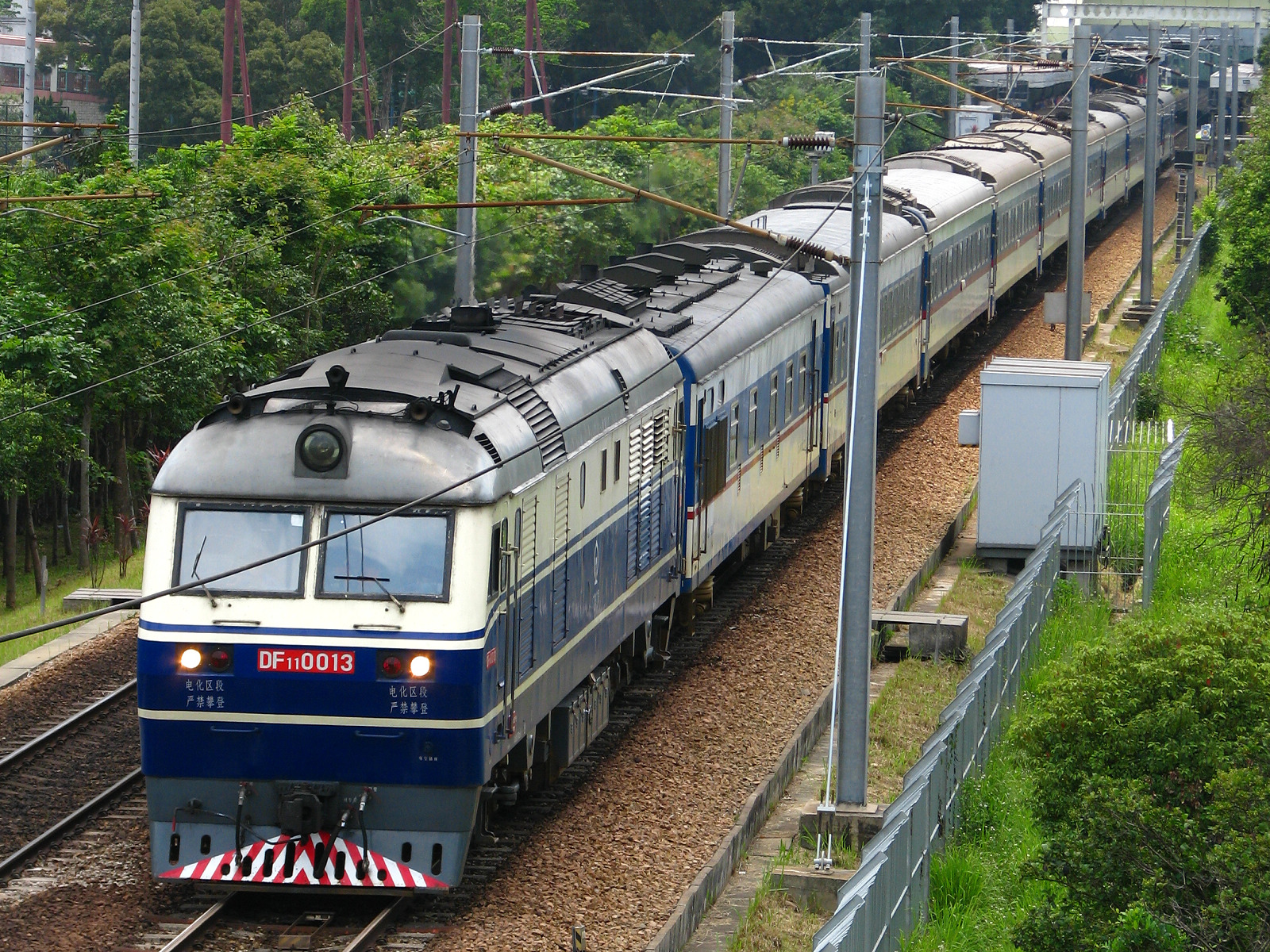 A China Railways DF11 diesel locomotive was hauling a Through Train from Guangzhou to Kowloon, Hong Kong.